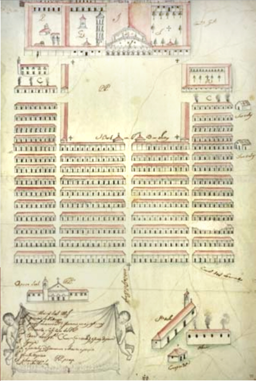 Plano da Redução de São Miguel Arcanjo